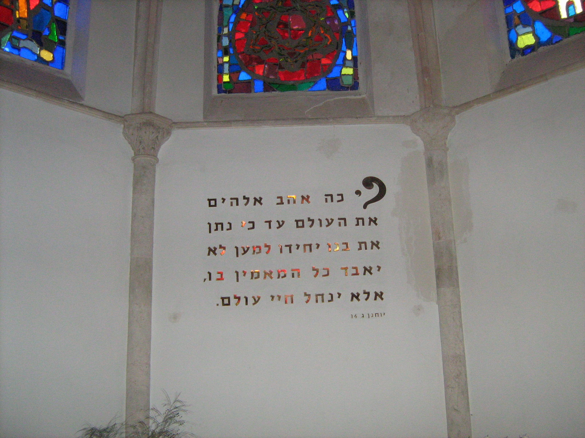 המושבה האמריקאית ביפו